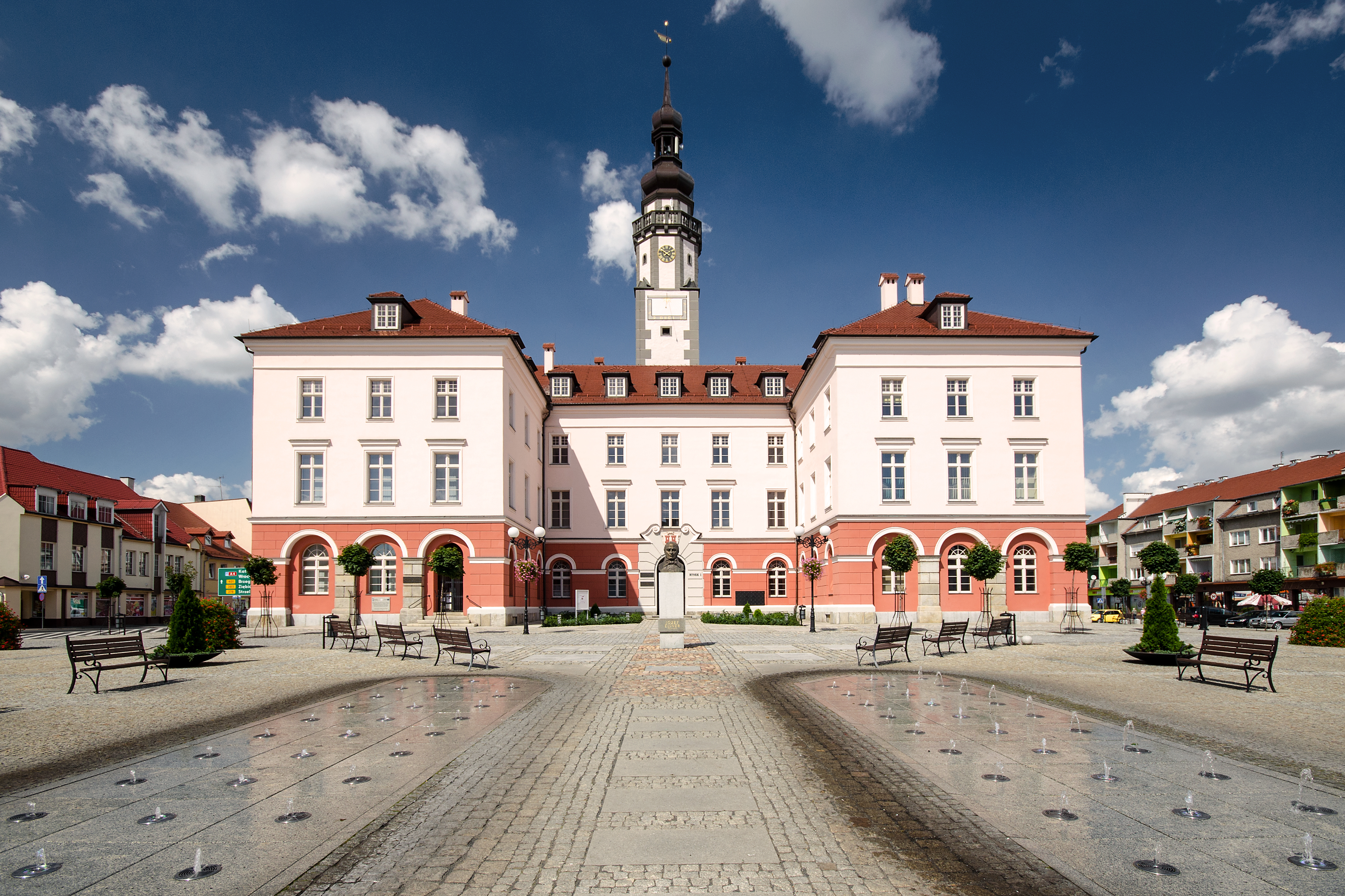 Grodków, ratusz, 1688, 1836-1840, l. 30. XX